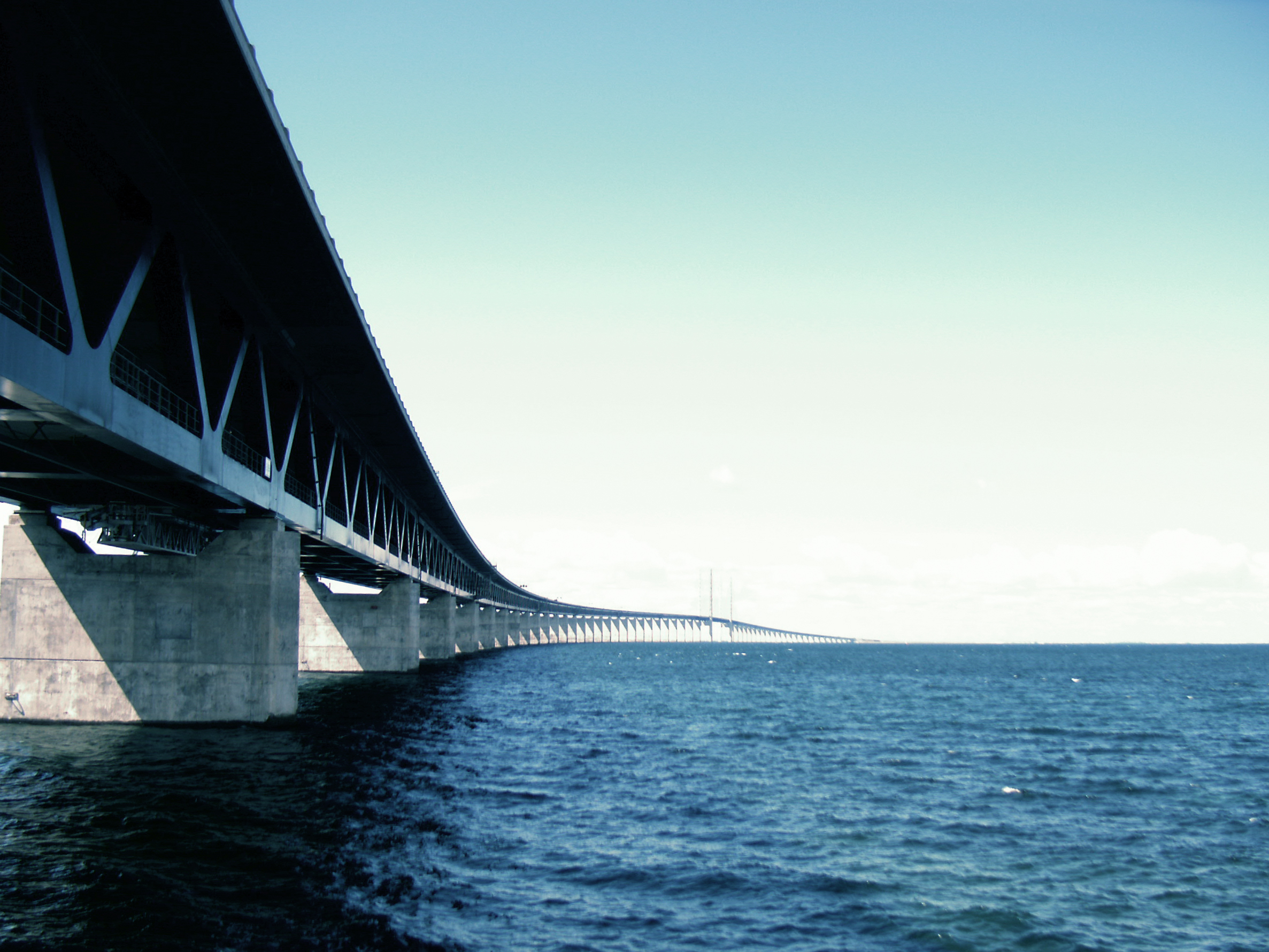 Öresund mit Öresundbrücke